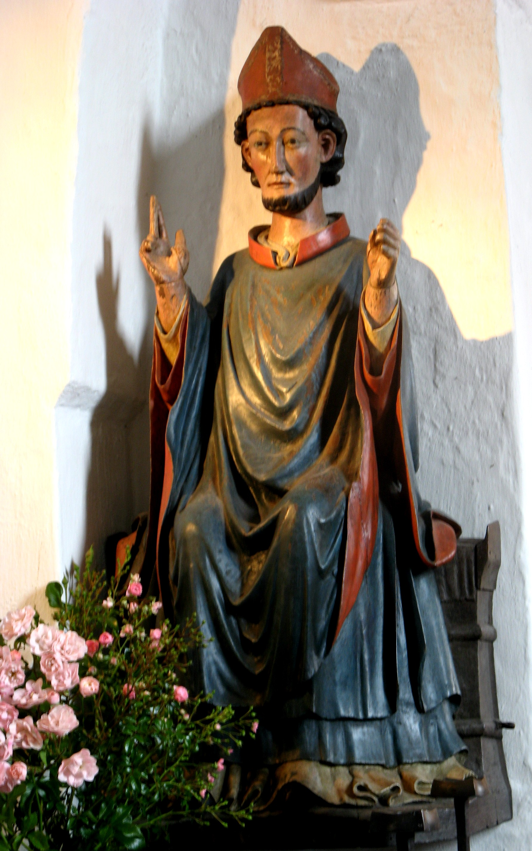 Hl. Nikolaus in der Kirche St. Nicolai auf Föhr